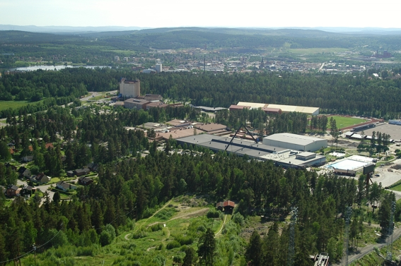 Blick von der Skischanze auf Falun und seine Wälder